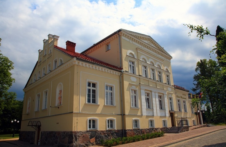 Rekowo Górne, ul. Lipowa 24 - pałac, obecnie hotel